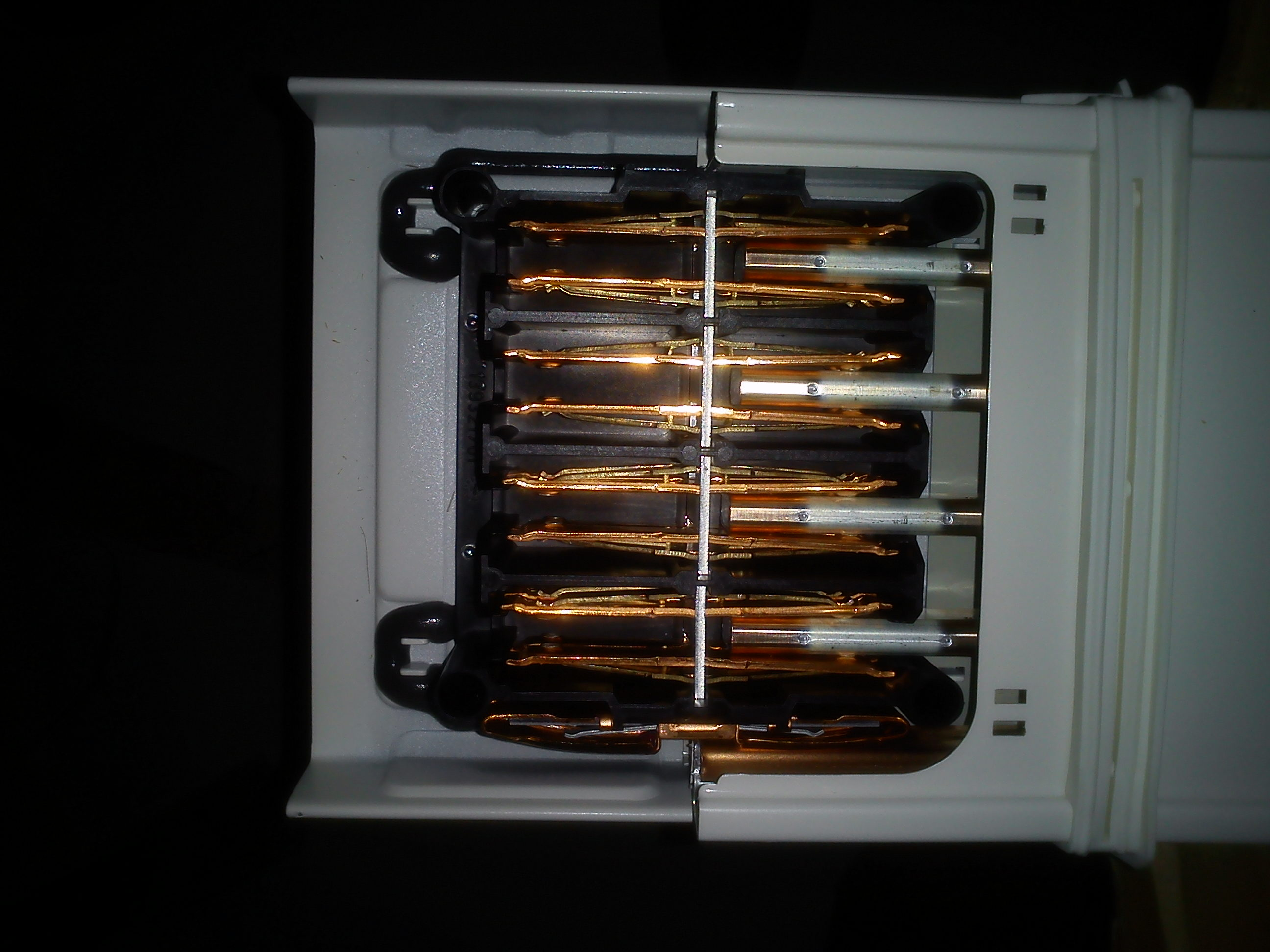 Губки з'єднувальної коробки прямих секцій шинопровода